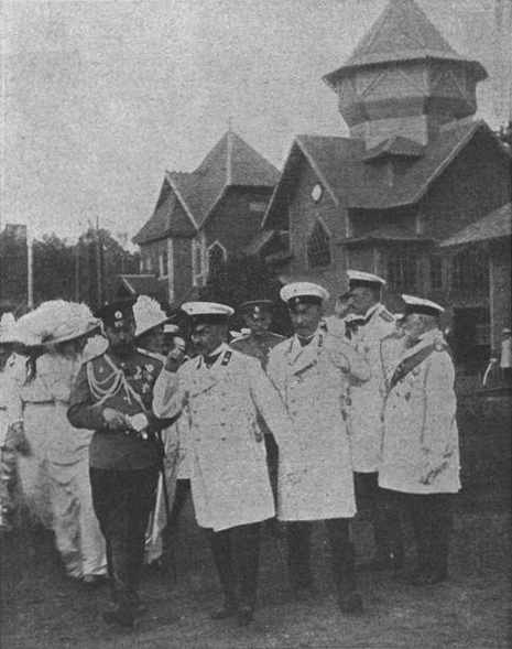 1913 год, Кострома. Николай II с дочерьми на земской выставке. Дает объяснения Костромской губернатор Стремоухов.